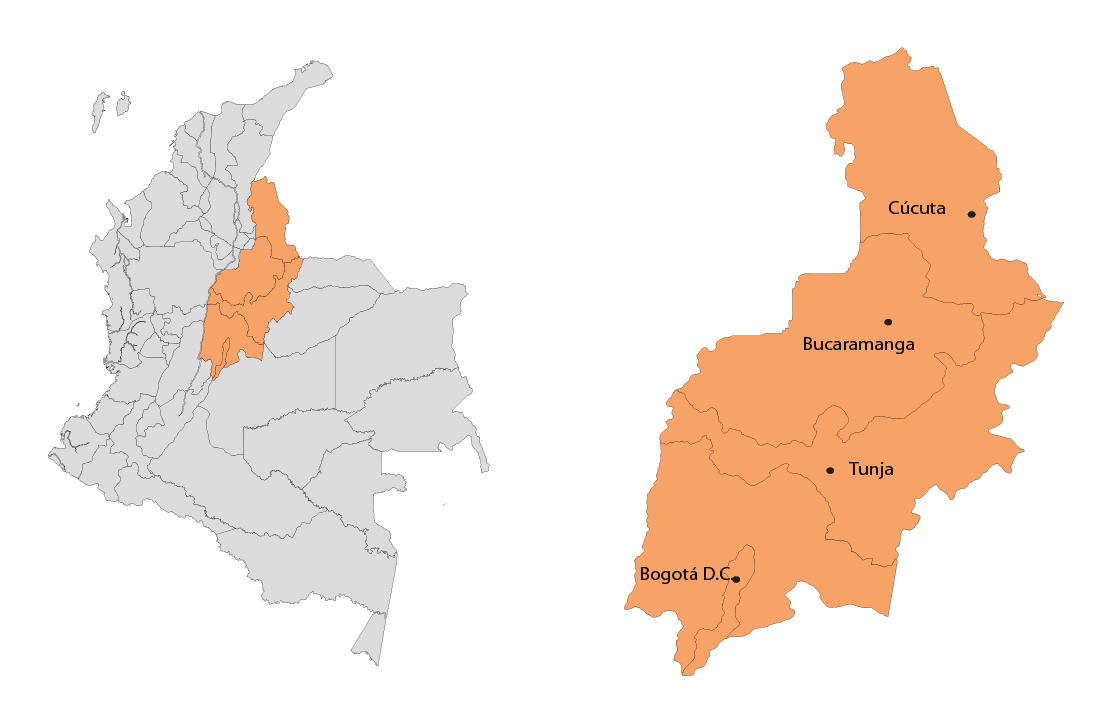 Eje musical Andino Centro-oriental